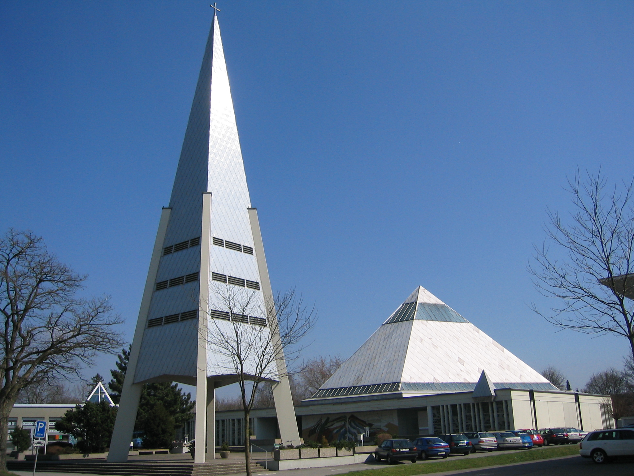 katholische Kirche St. Columban in Friedrichshafen selbst fotografiert am 7. April 2006